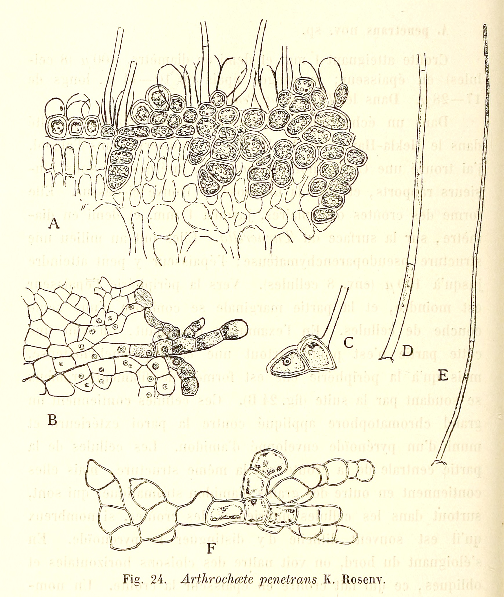 Arthrochaete penetrans Rosenvinge